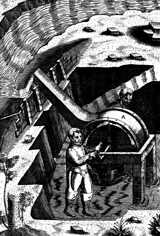 1588年出版的《阿戈斯蒂诺·拉梅利上尉的各种精巧的机械装置》（Le Diverse t Artificiose Machine delCapitano Agostino Ramelli）中关于水泵的插图。